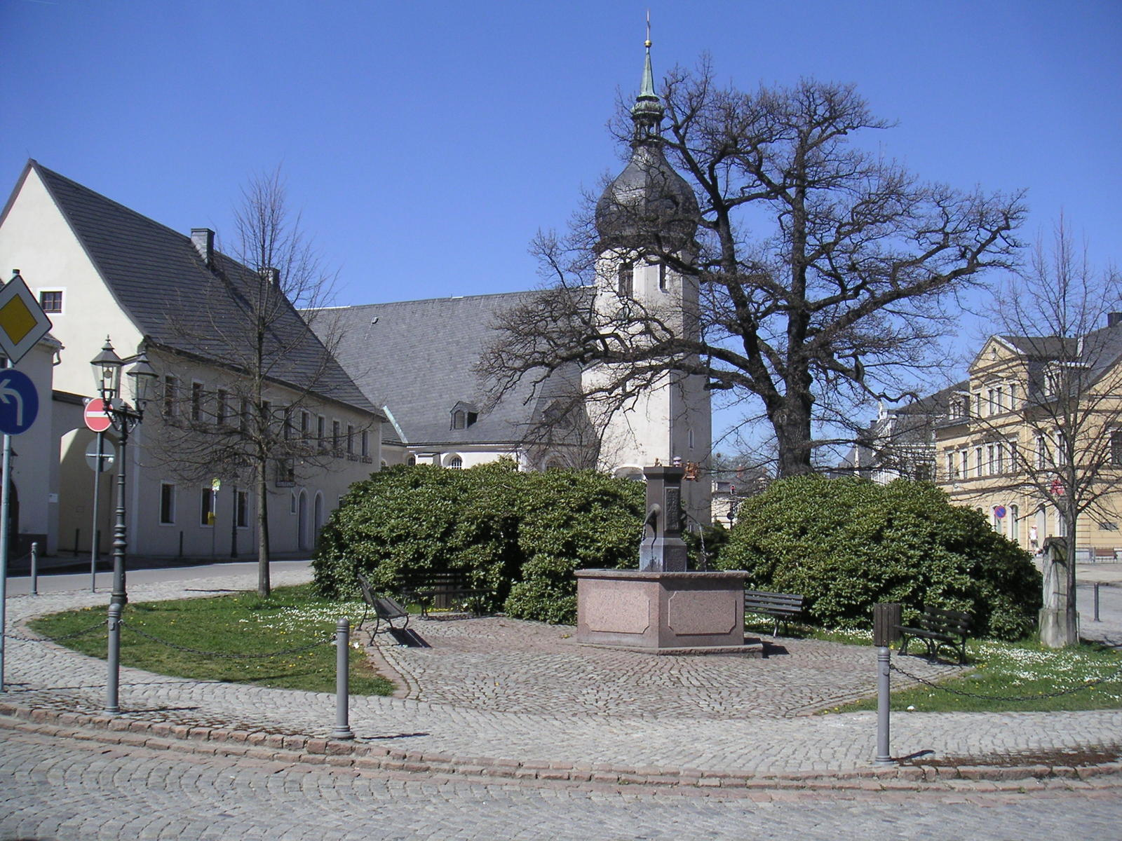 Brunnen am Olbernhauer Marktplatz - Denkmalschutzgebiet Markt Olbernhau.